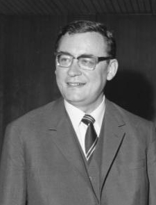 Title: Kanzler Kiesinger empfängt Bürgermeister Schütz People in the image: Kiesinger, Kurt Georg: Bundeskanzler, Ministerpräsident von Baden-Württemberg, CDU, Bundesrepublik Deutschland (GND 118562053) * Schütz, Klaus: MdB, SPD, Regierender Bürgermeister von Berlin-West, Bundesrepublik Deutschland Factual corrections and alternative descriptions are encouraged separately from the original description. Additionally errors can be reported at this page to inform the Bundesarchiv. Original historic description: Bundeskanzler Kiesinger [Mitte rechts] empfängt den Reg. Bürgermeister von Berlin, Klaus Schütz [Mitte links]